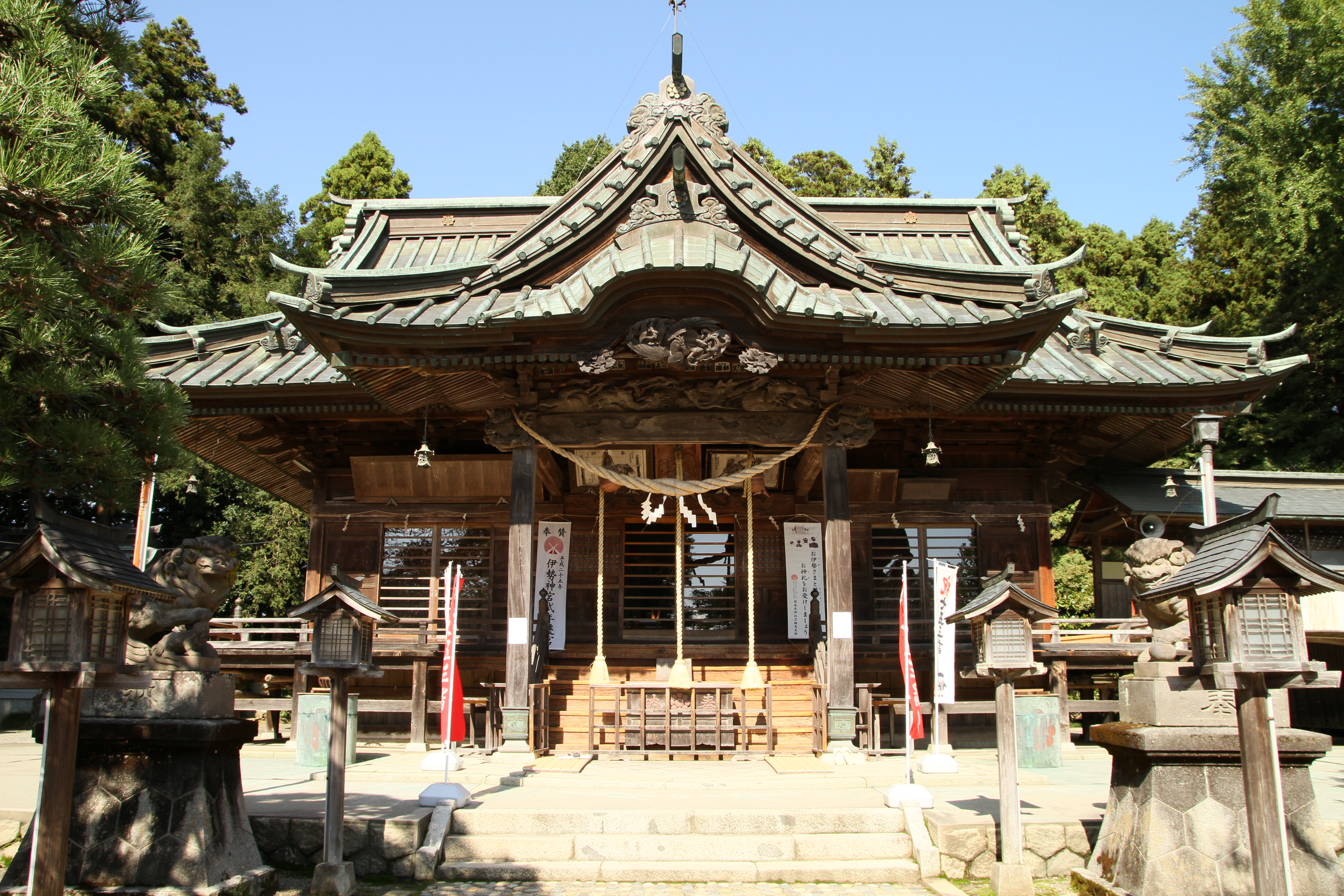 小高神社の拝殿